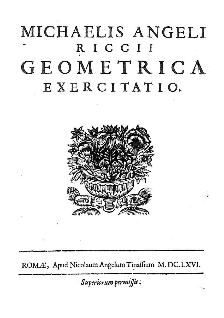 Michaelis Angeli Riccii Geometrica exercitatio. - Romae : apud Nicolaum Angelum Tinassium, 1666. - 18 p. : ill. ; 4°.